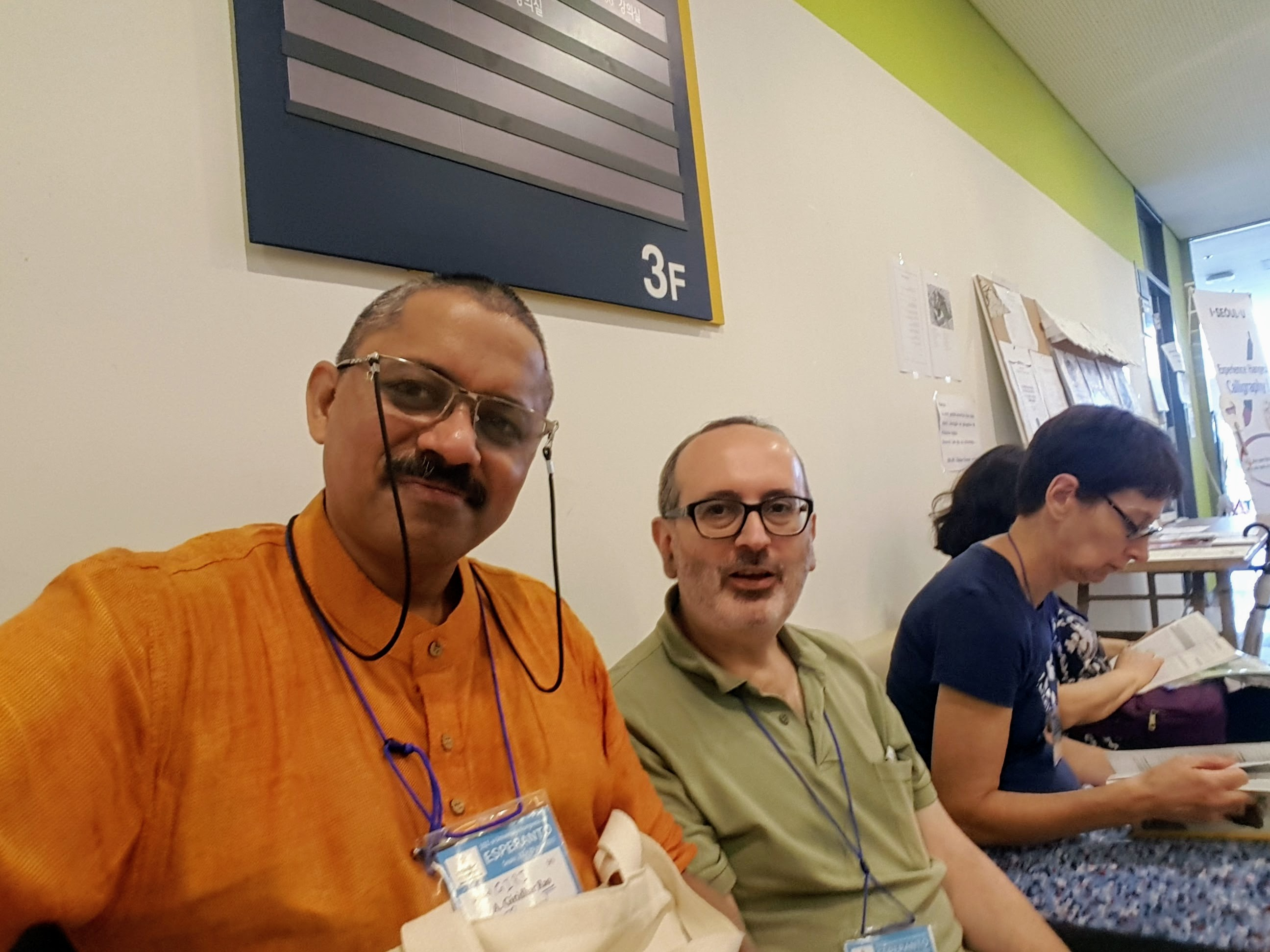 A. Giridhar RAO (maldekstre) kaj Ricardo Albert REYNA dum la Universala Kongreso de Esperanto en Seulo, 2017.